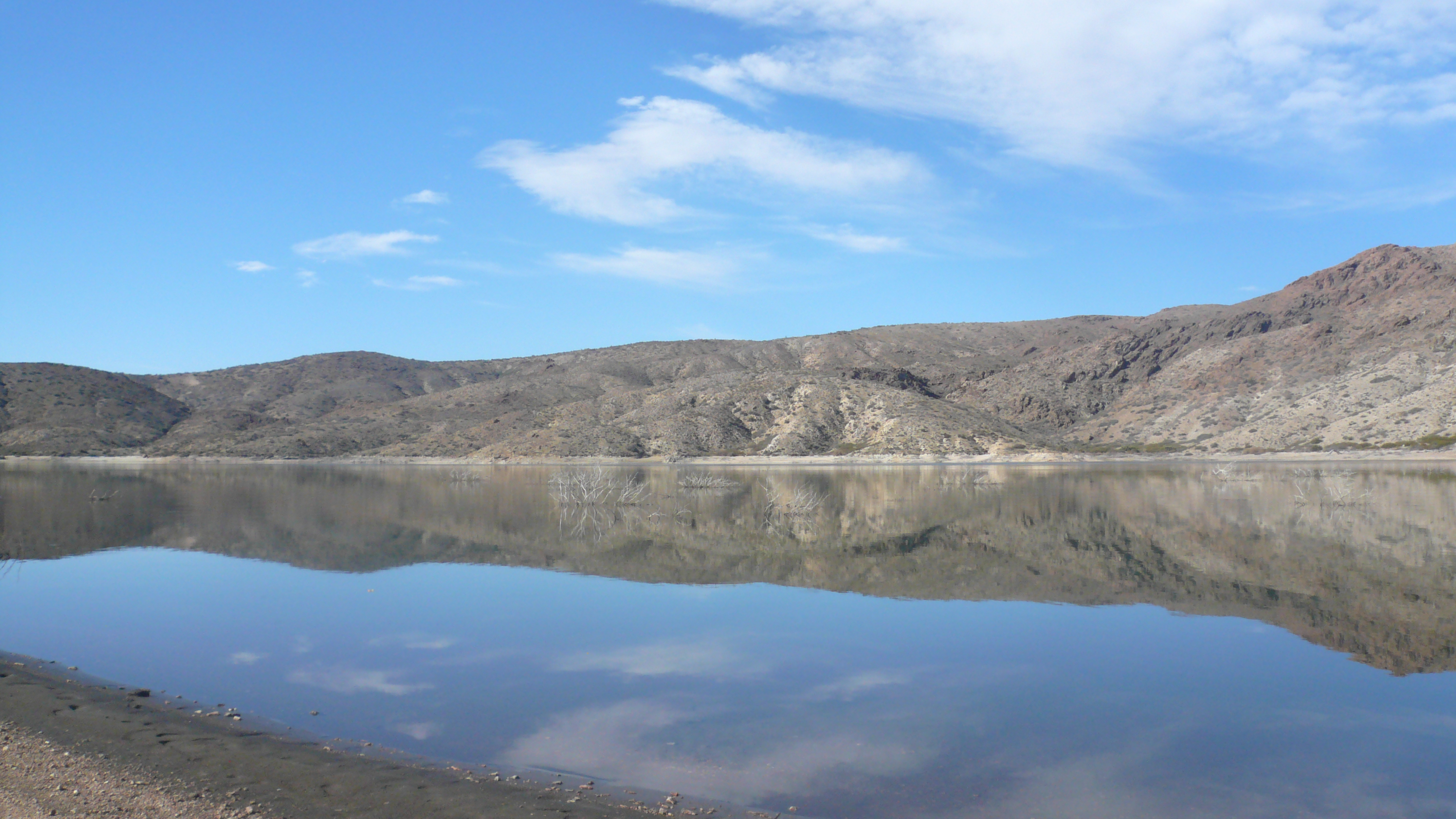 Lago que inundó el antiguo asentamiento de la Comunidad de Pilquiniyeu del Limay